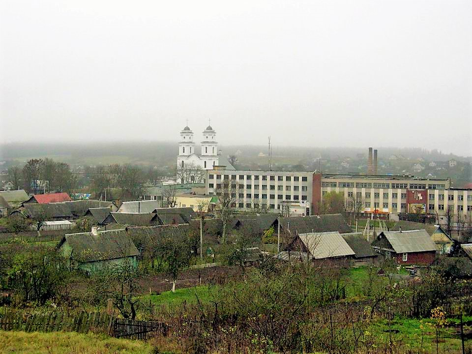 Беларуская (тарашкевіца): Радашкавічы